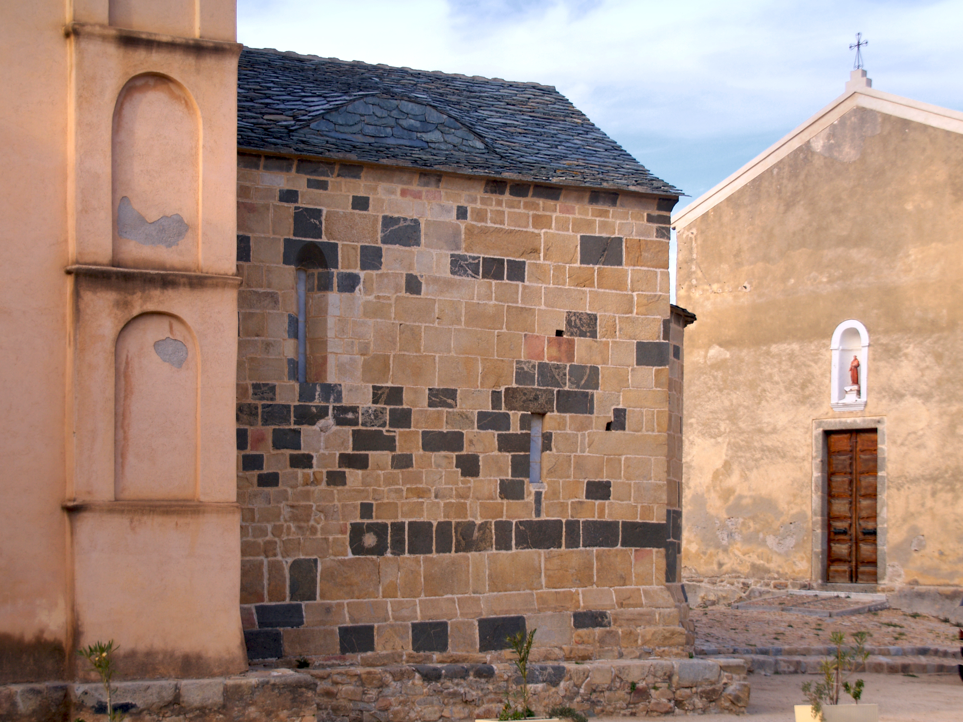 Santa-Reparata-di-Balagna (Corsica) - Abside de l'église Sainte-Réparate et la confrérie